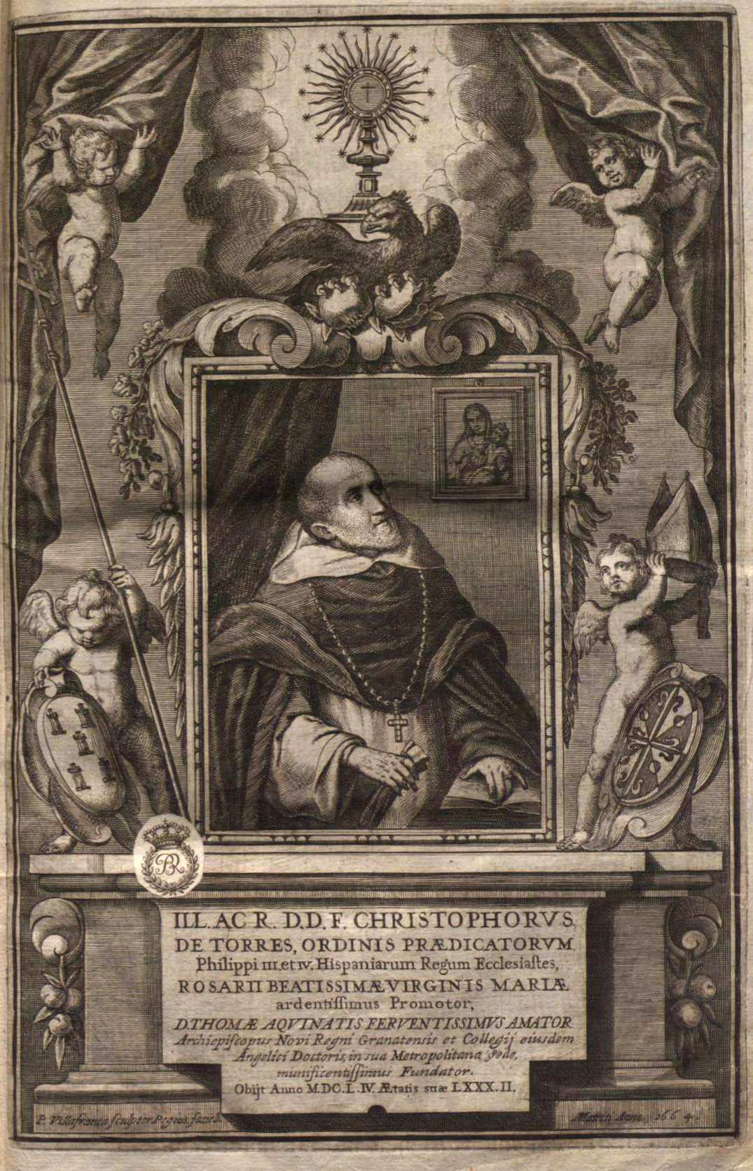 Frontispicio de "Lengua eucharistica del hombre bueno : tan abundante como proporcionada con el quinto Doctor Angel Santo Tomas de Aquino...distribuida para los principiantes en discursos theologicos de cathedra, y púlpito ... obra posthuma del ... Arçobispo de Santa Fè, el maestro Don Fray Cristoual de Torres, hijo de la insigne familia de Predicadores ...", con el retrato del autor grabado de Pedro de Villafranca, Madrid, Pablo del Val, 1665. Biblioteca Nacional de España.